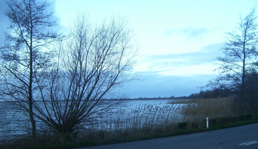 Vuntus Lake as seen from Veendijk road at Oud-Loosdrecht